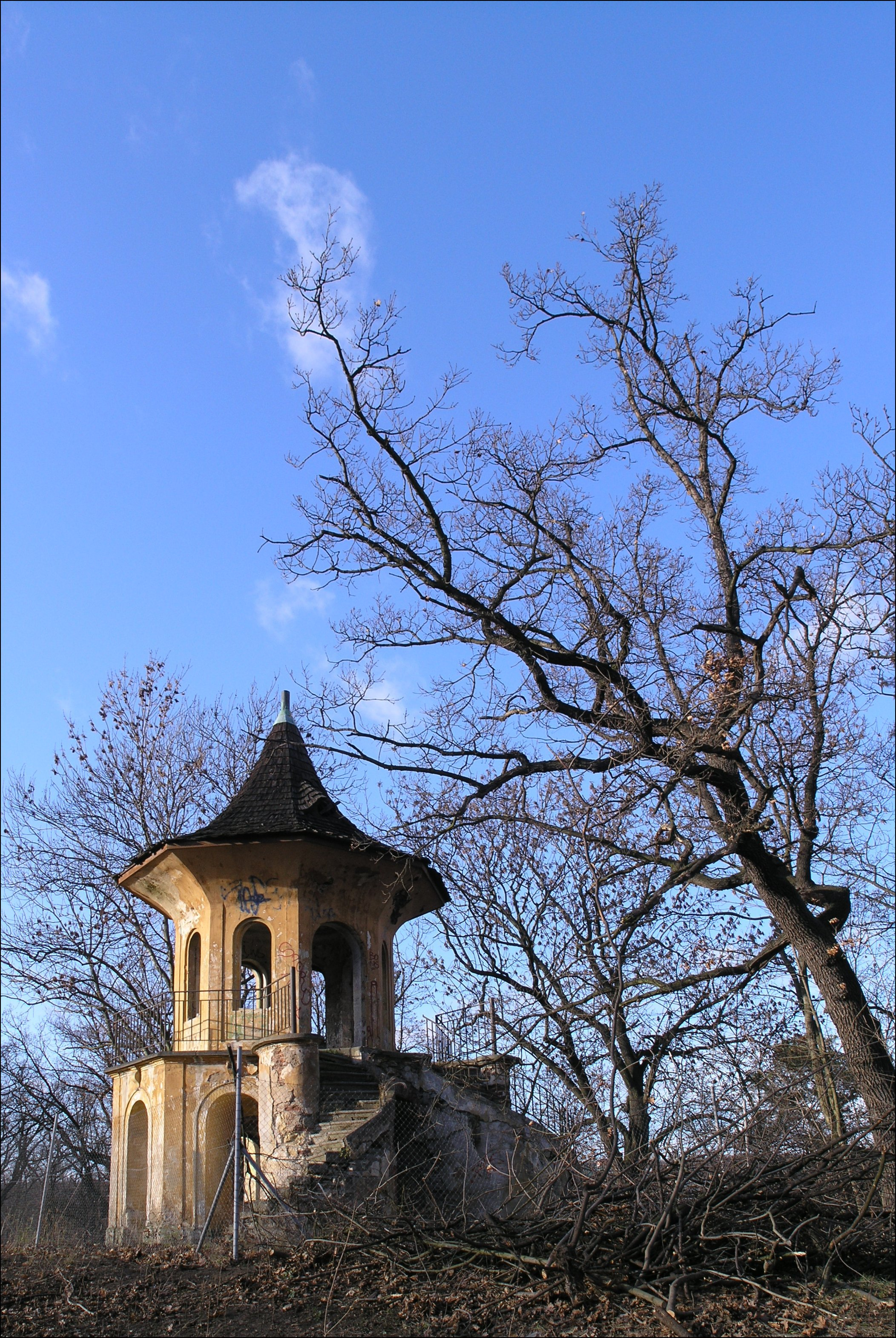 Čínský altán